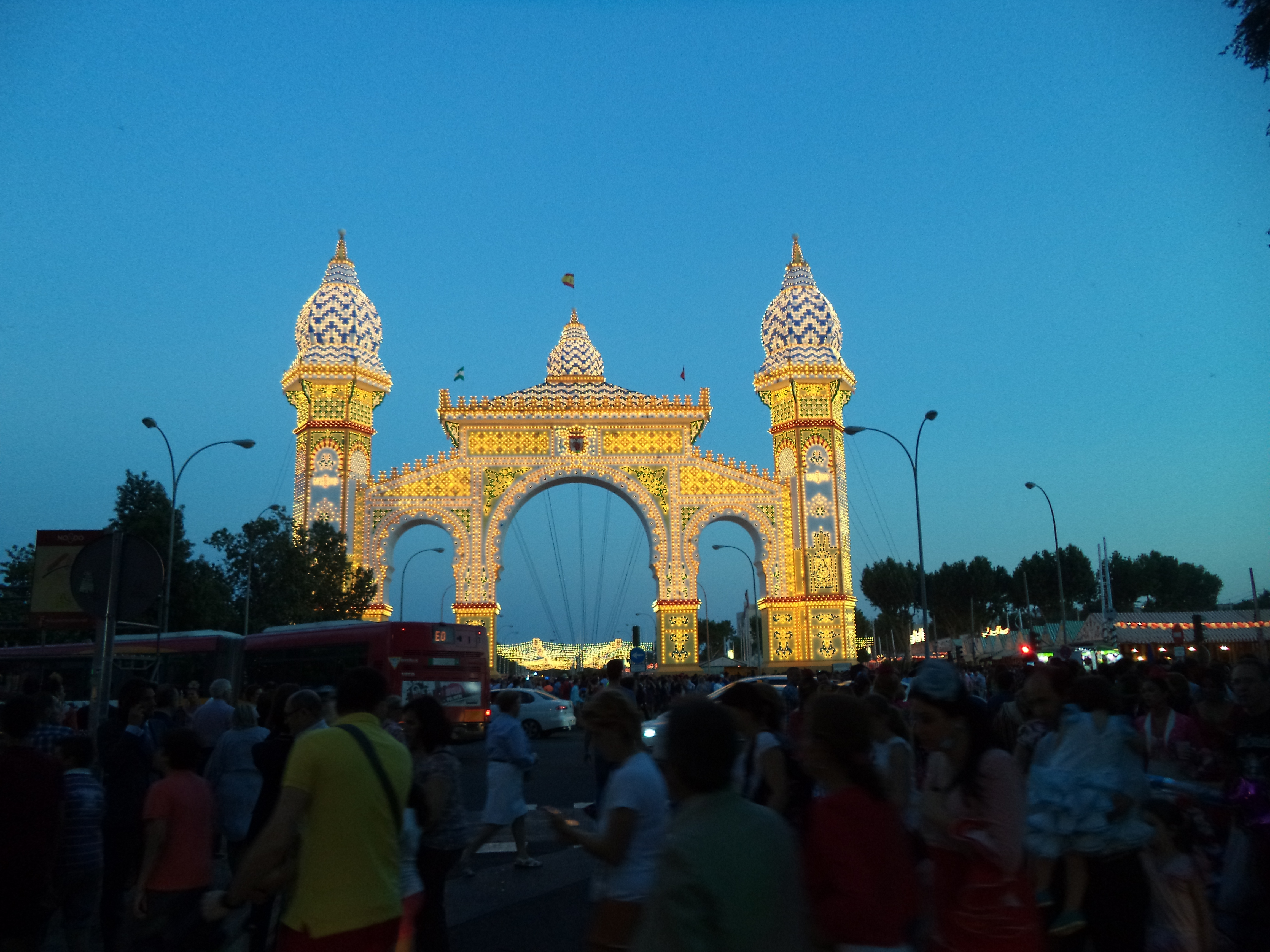 Portada de 2014 iluminada al caer la noche. Su diseño está inspirado en los antiguos kioscos del agua de la ciudad